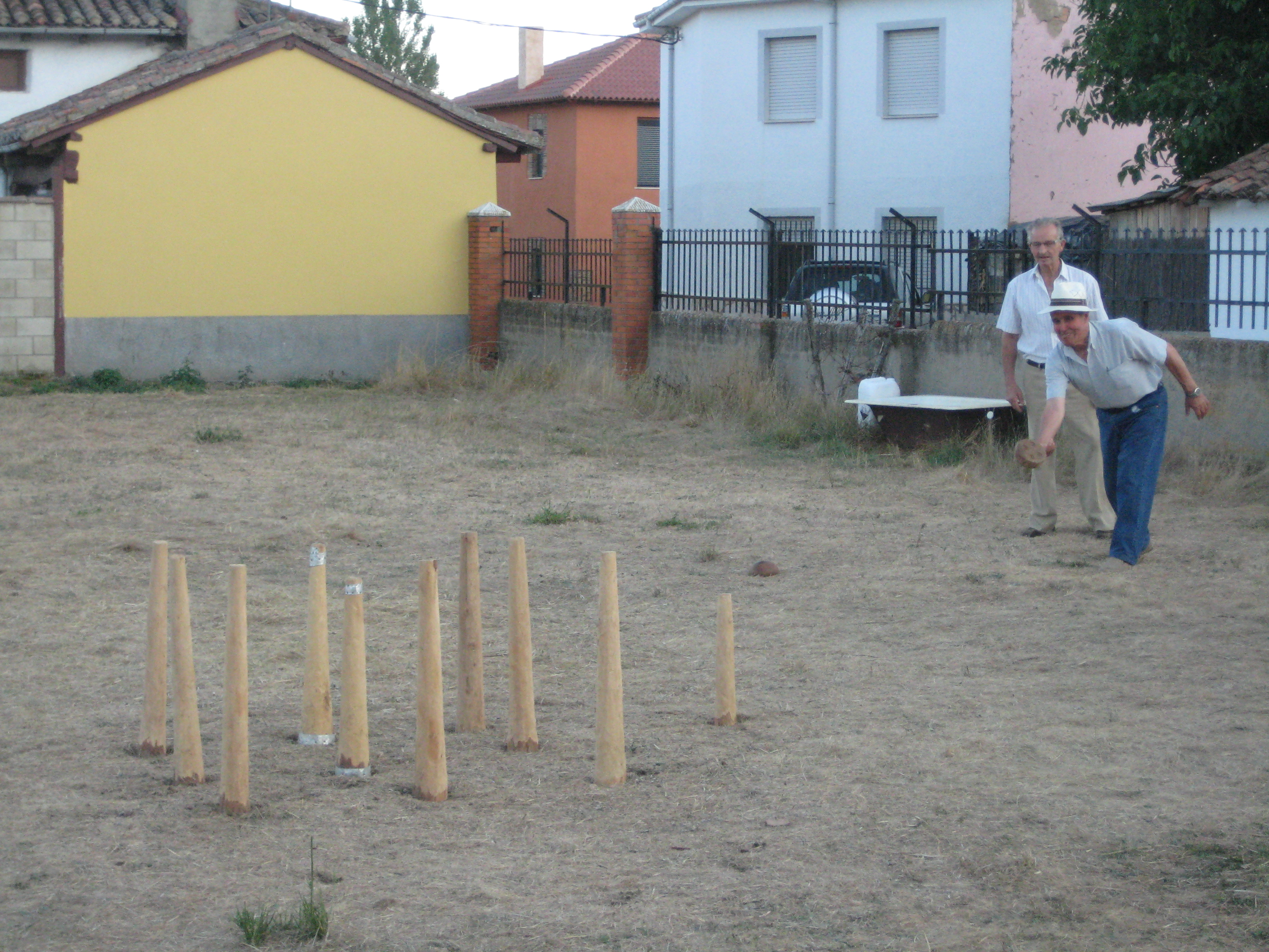 Bolos17Julio2013